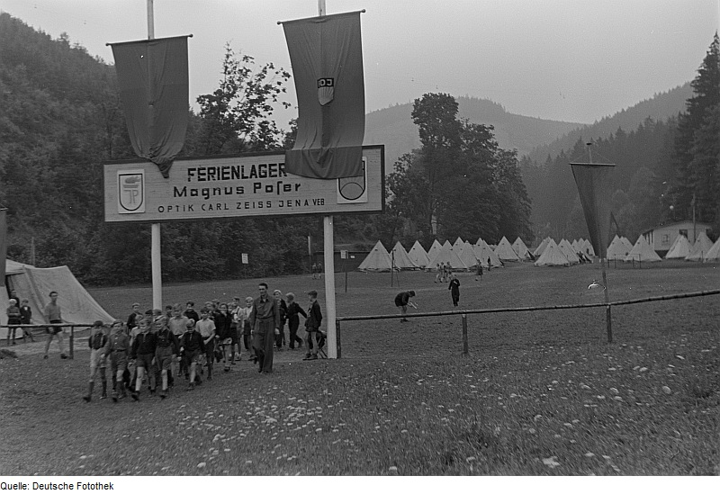 Original image description from the Deutsche Fotothek Ansicht des Lagers mit Kindergruppe